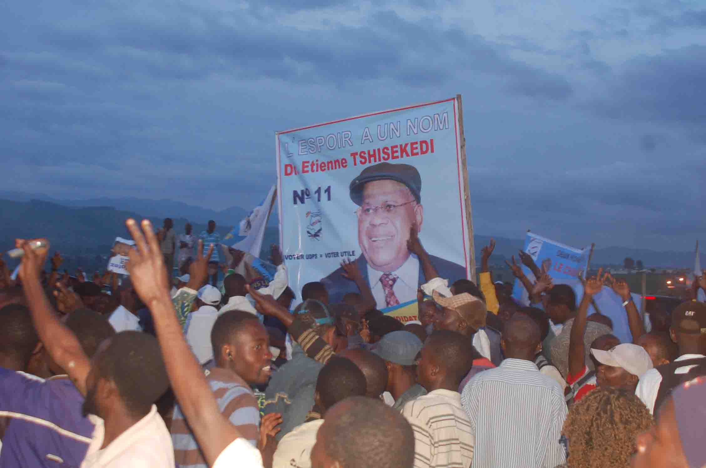 Tshisekedi Bukavu Rally 2011